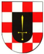 Wappen der Ortsgemeinde Winningen, Verbandsgemeinde Untermosel, Landkreis Mayen-Koblenz 5insignia°